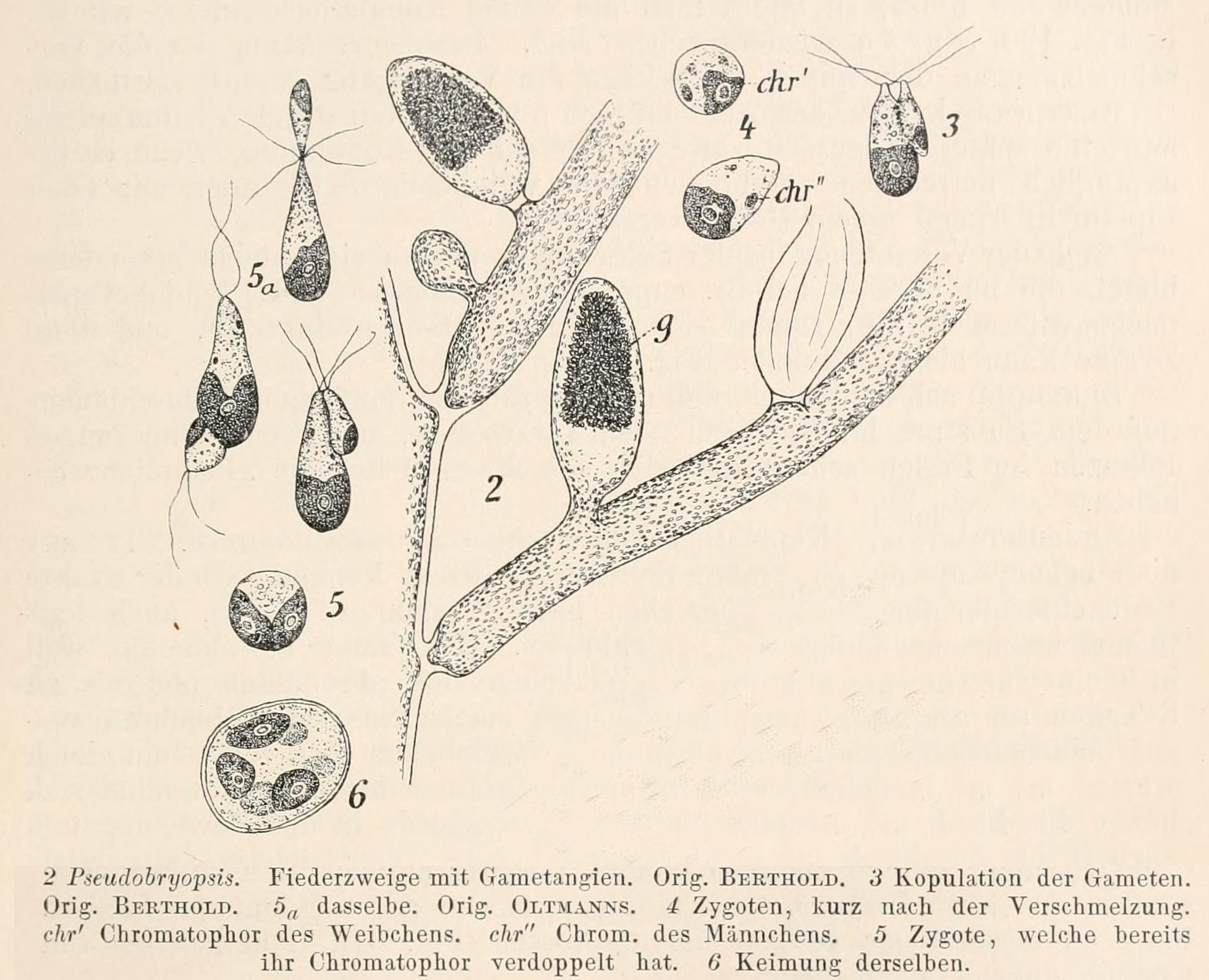 2–6. Pseudobryopsis myura (J.Agardh) Berthold